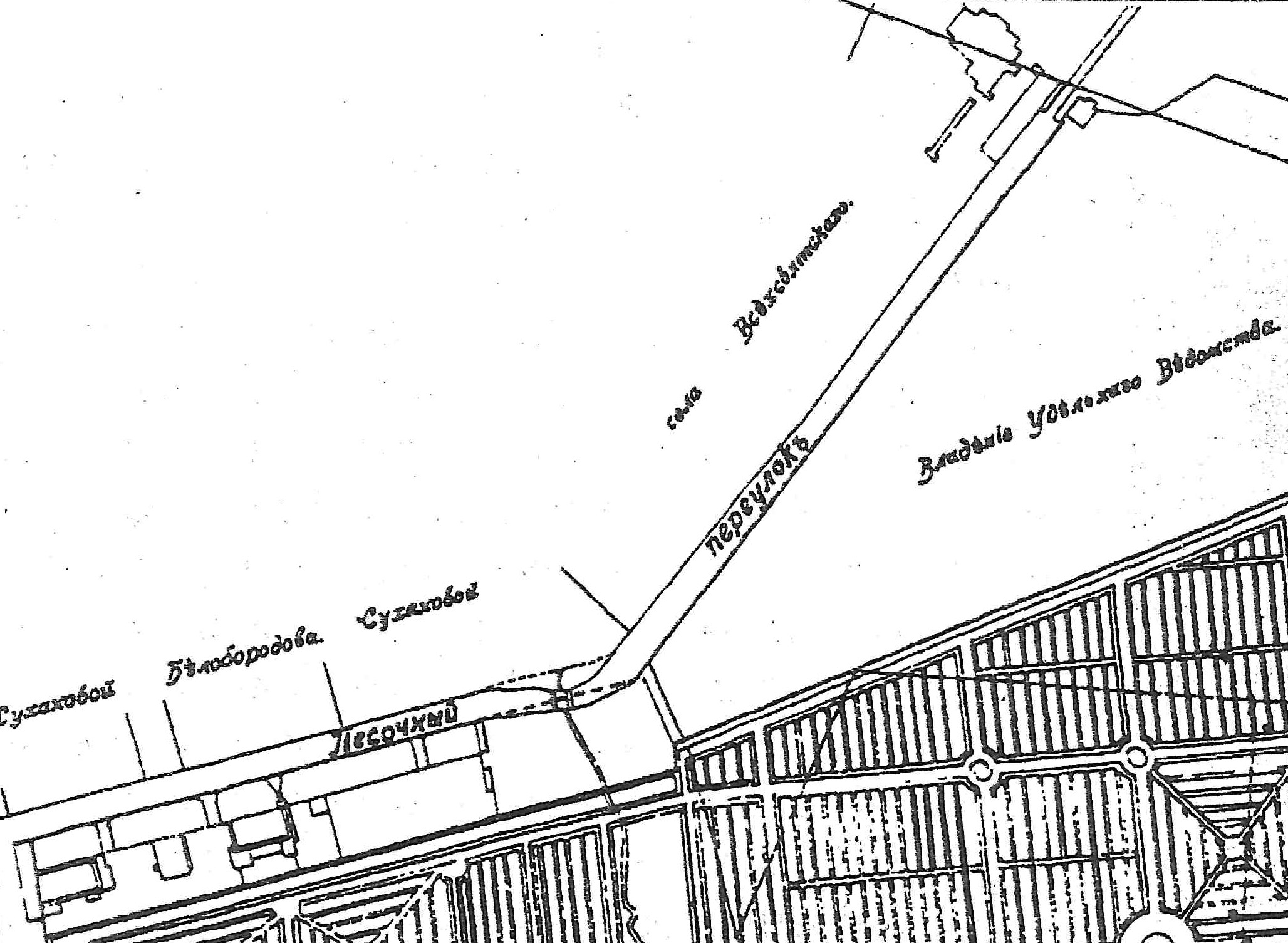 Песчаная улица на плане Братского кладбища 1916 года